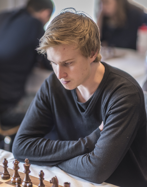 FM Tom Rydström. Foto: Lars OA Hedlund